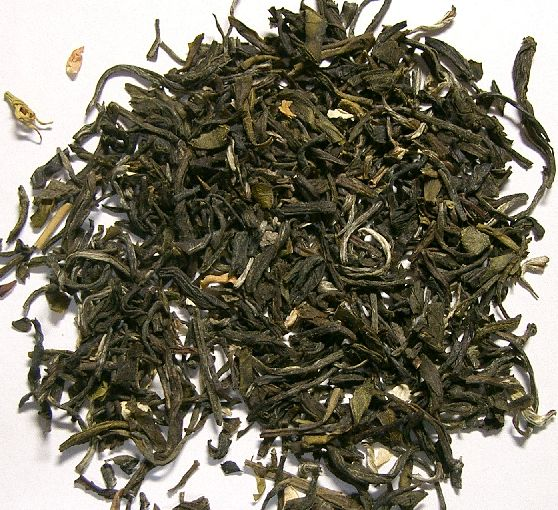 Jasmine tea